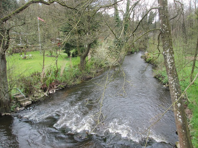 Trenen i Frørup (Frörup), Oeversø (Oeversee), Sydslesvig